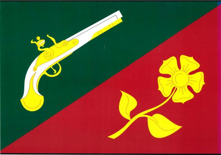 vlajka, Popůvky, okres Třebíč